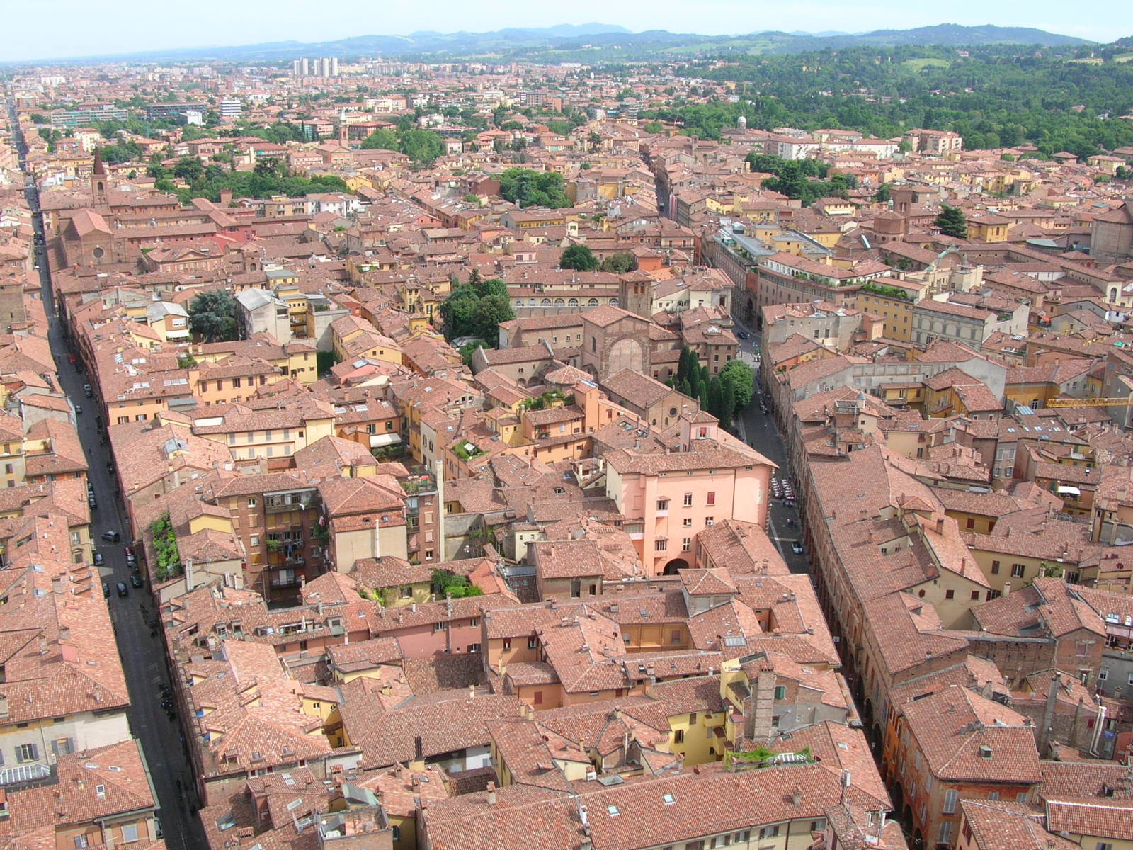 foto del raduno wikipedia bologna 2006 - Vista dall'alto della Torre degli Asinelli: il centro storico tra Strada Maggiore (a sinistra) e Via Santo Stefano (a destra), piazza Santo Stefano e il complesso delle Sette Chiese